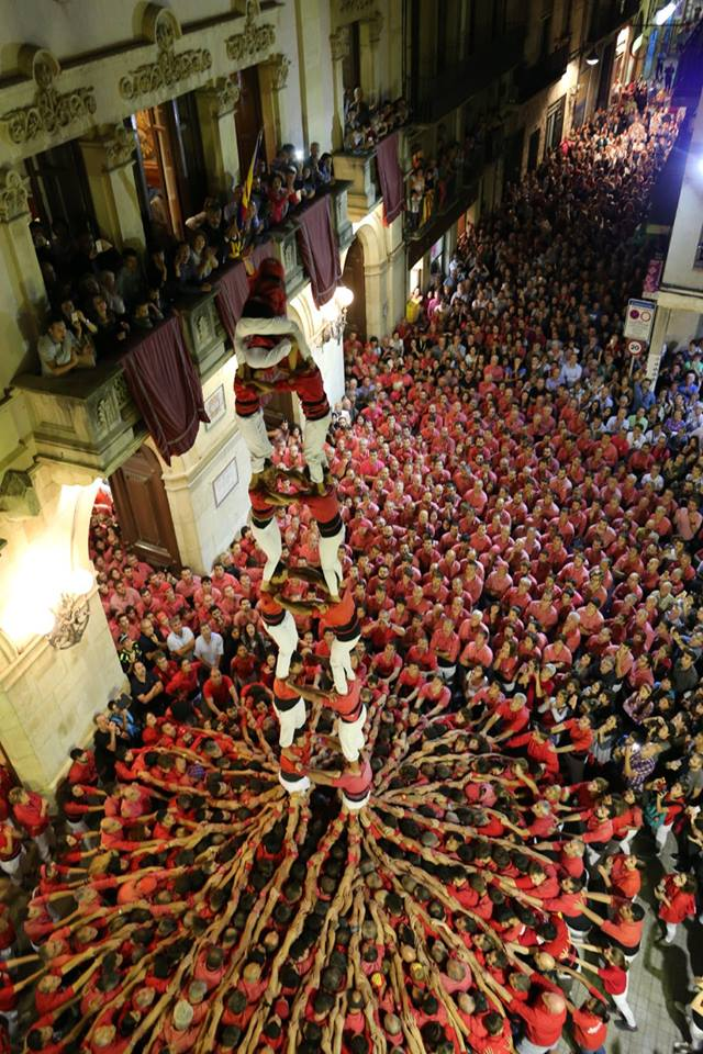 Perimer 2 de 8 sense folre descarregat per la CJXV i, tantmateix, el primer descarregat mai a Valls.